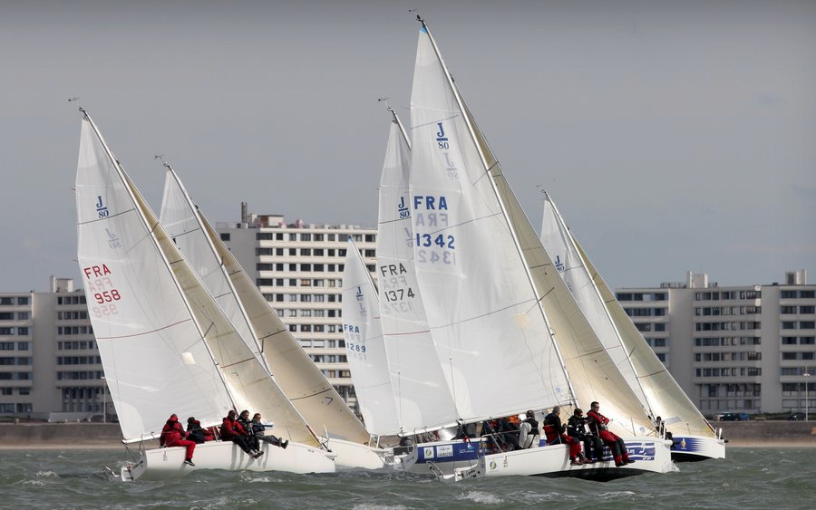 coupe de la Duchesse Anne à Dunkerque en avril 2013